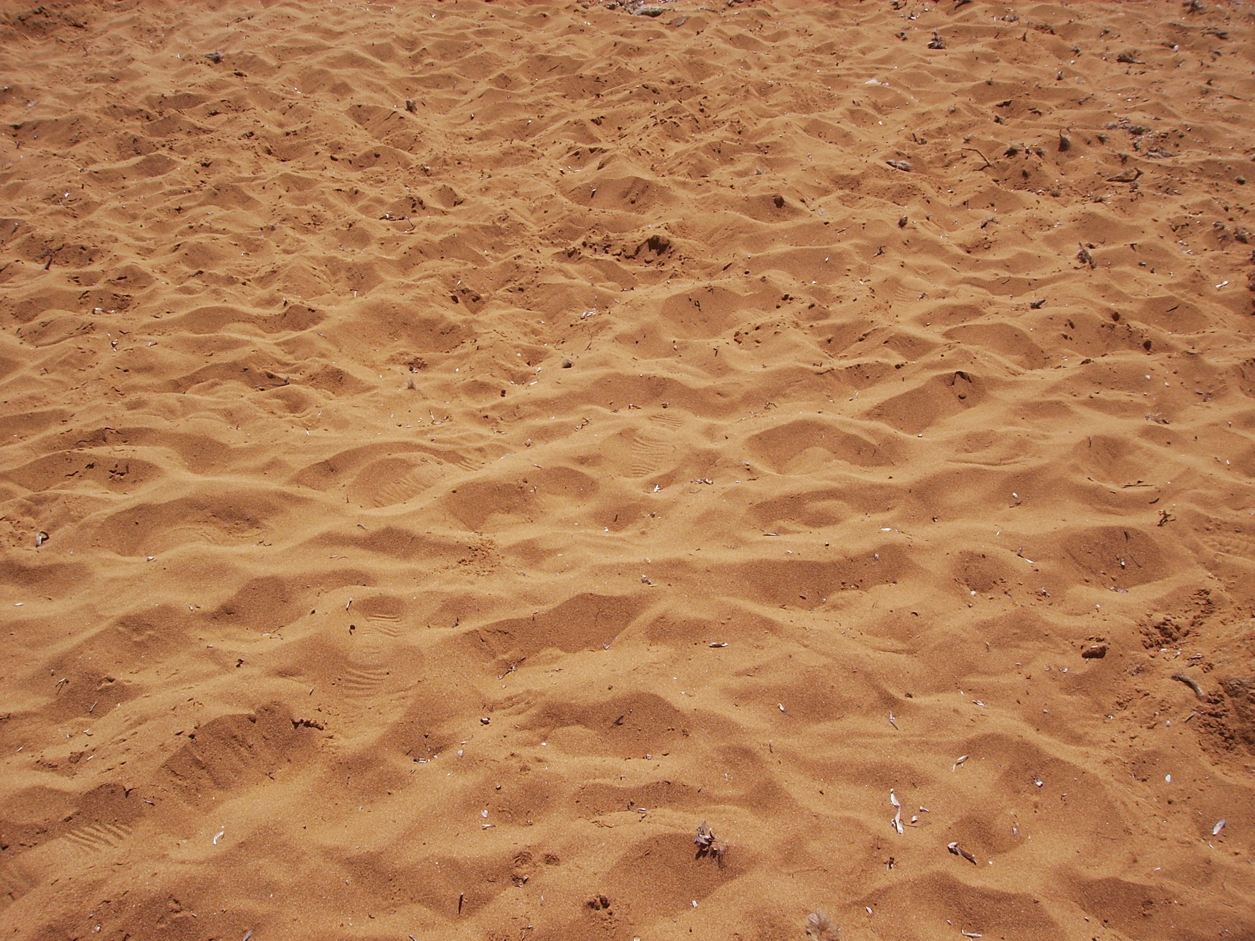 Ramla Bay